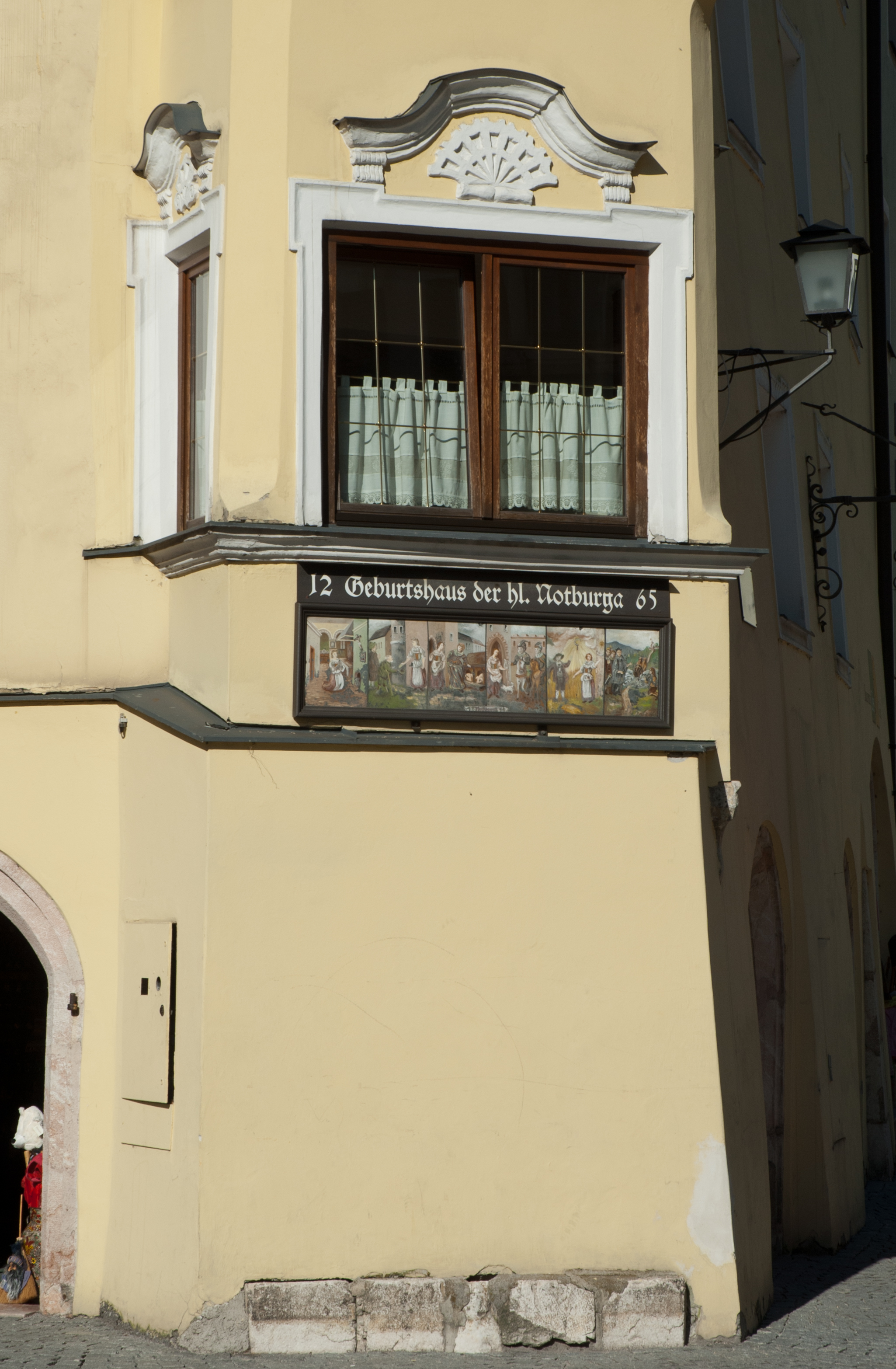 Detail vom Notburgahaus Rattenberg